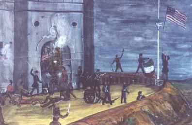 Toma del Cerro del Obispado